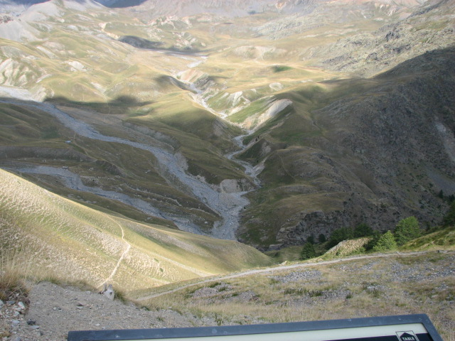 Vue du vallon de Salso Moreno depuis le bloc B6 de l'avant-poste du Col des Fourches (Alpes-Maritimes)